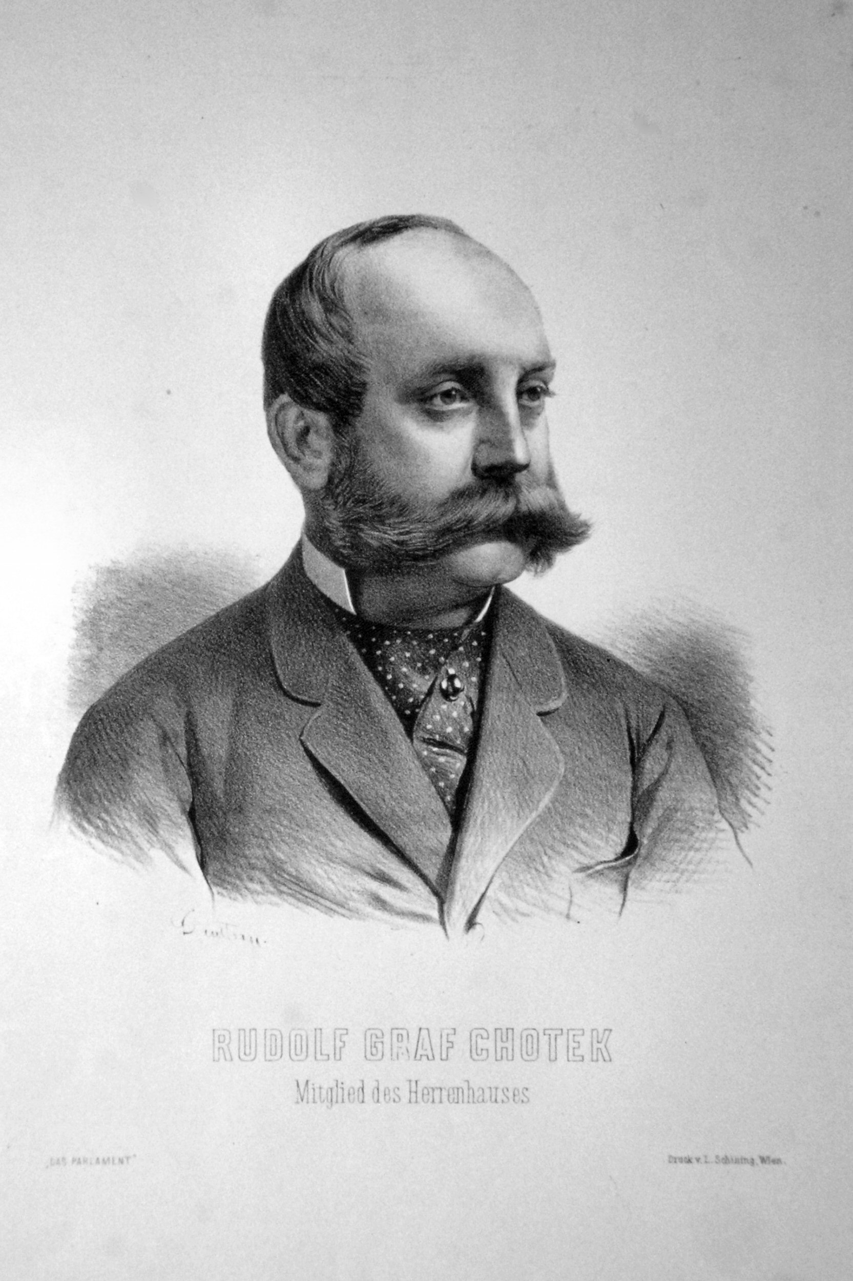 Rudolf Karl Reichsgraf Chotek von Chotkow und Wognin (1832-1894), österreichischer Politiker, Mitglied des Herrenhauses,.k. k. Kämmerer. Lithographie von Adolf Dauthage, ca. 1880